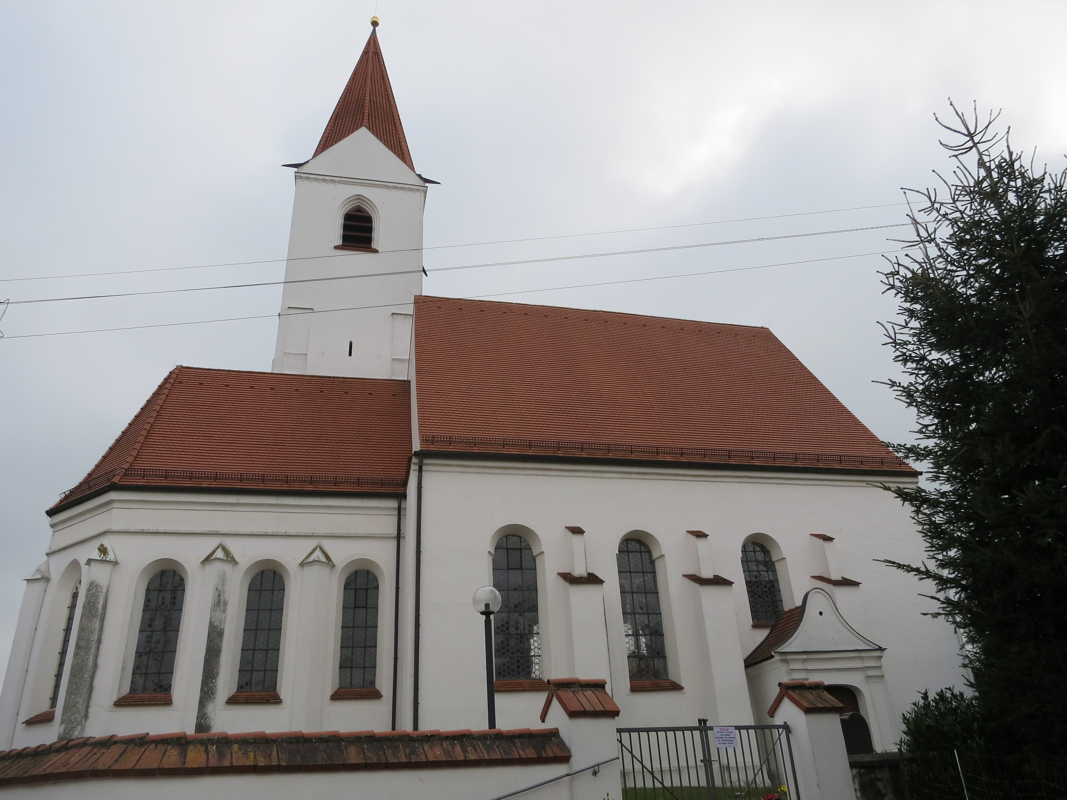 Eine spätgotische Saalkirche in einem kleinen Ort